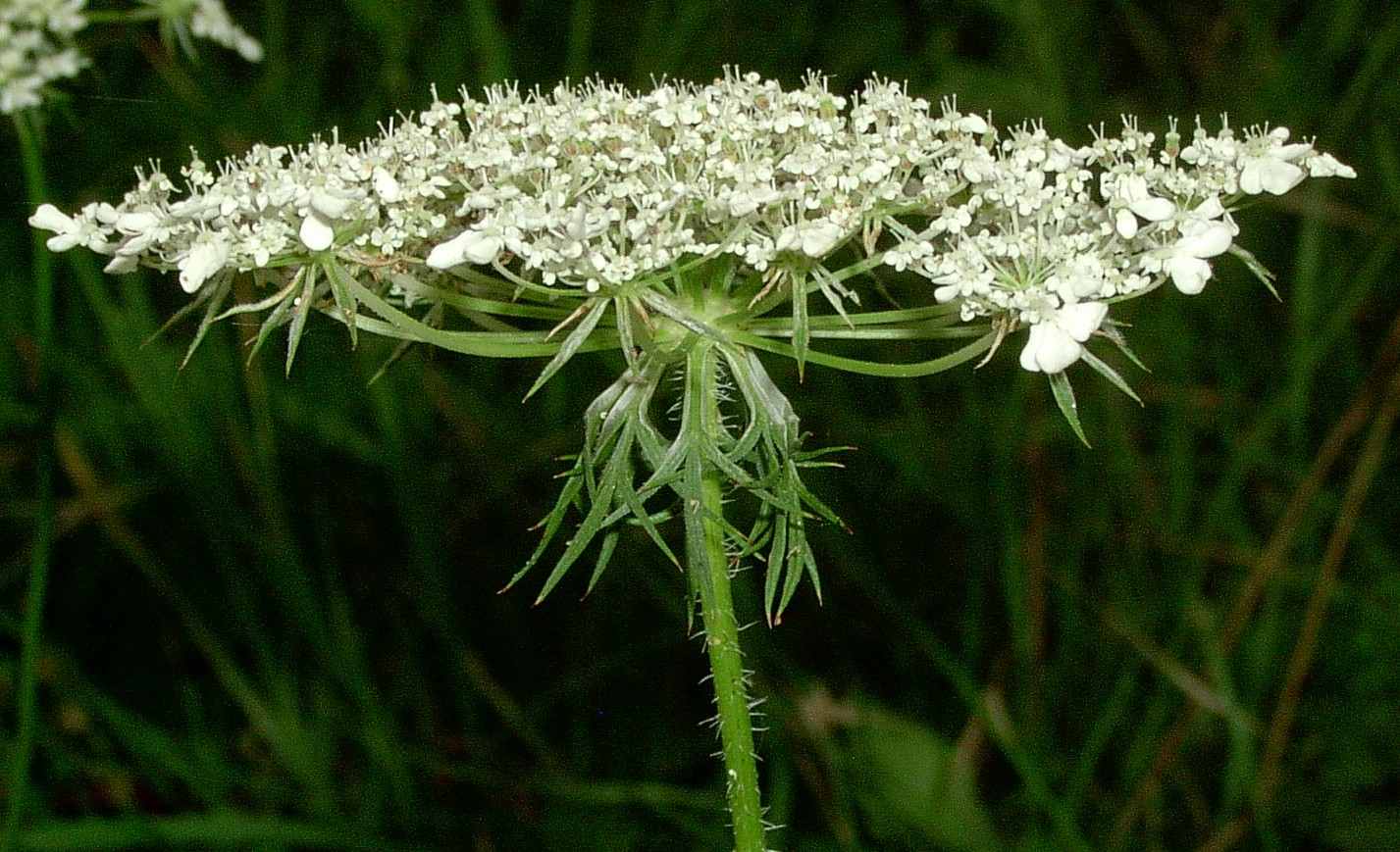 Daucus carota, inflorescence. Gryfino, NW Poland